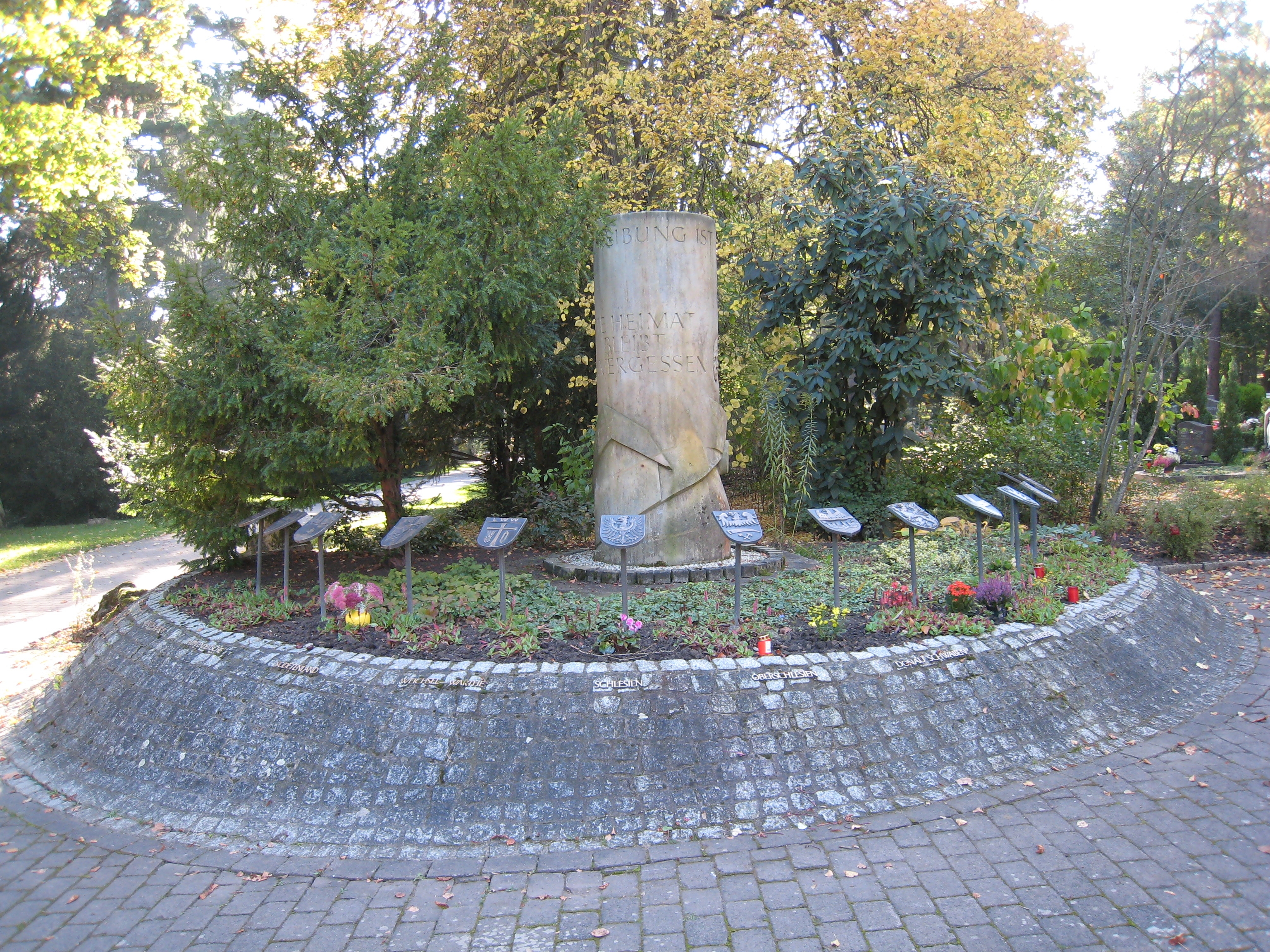 Vertriebenendenkmal Hauptfriedhof Erfurt 2